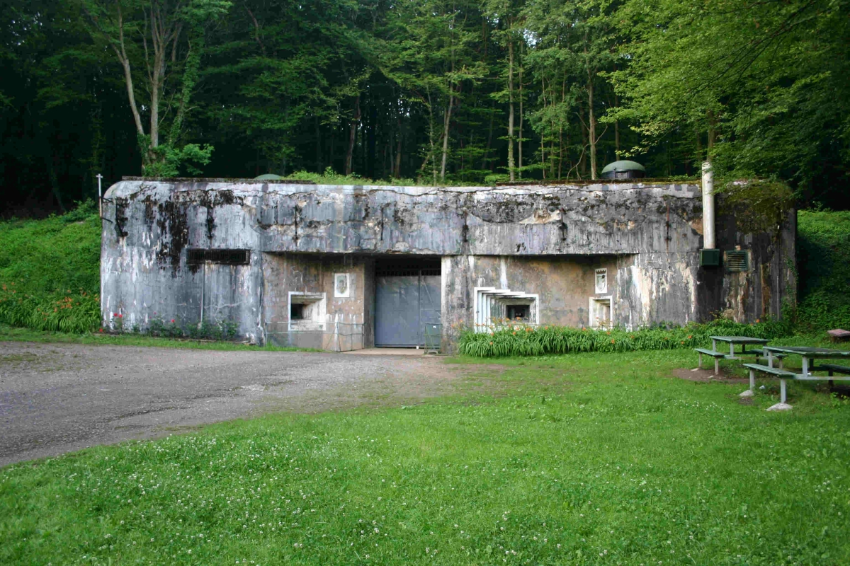 Eingang des Artilleriewerk Michelsberg A22